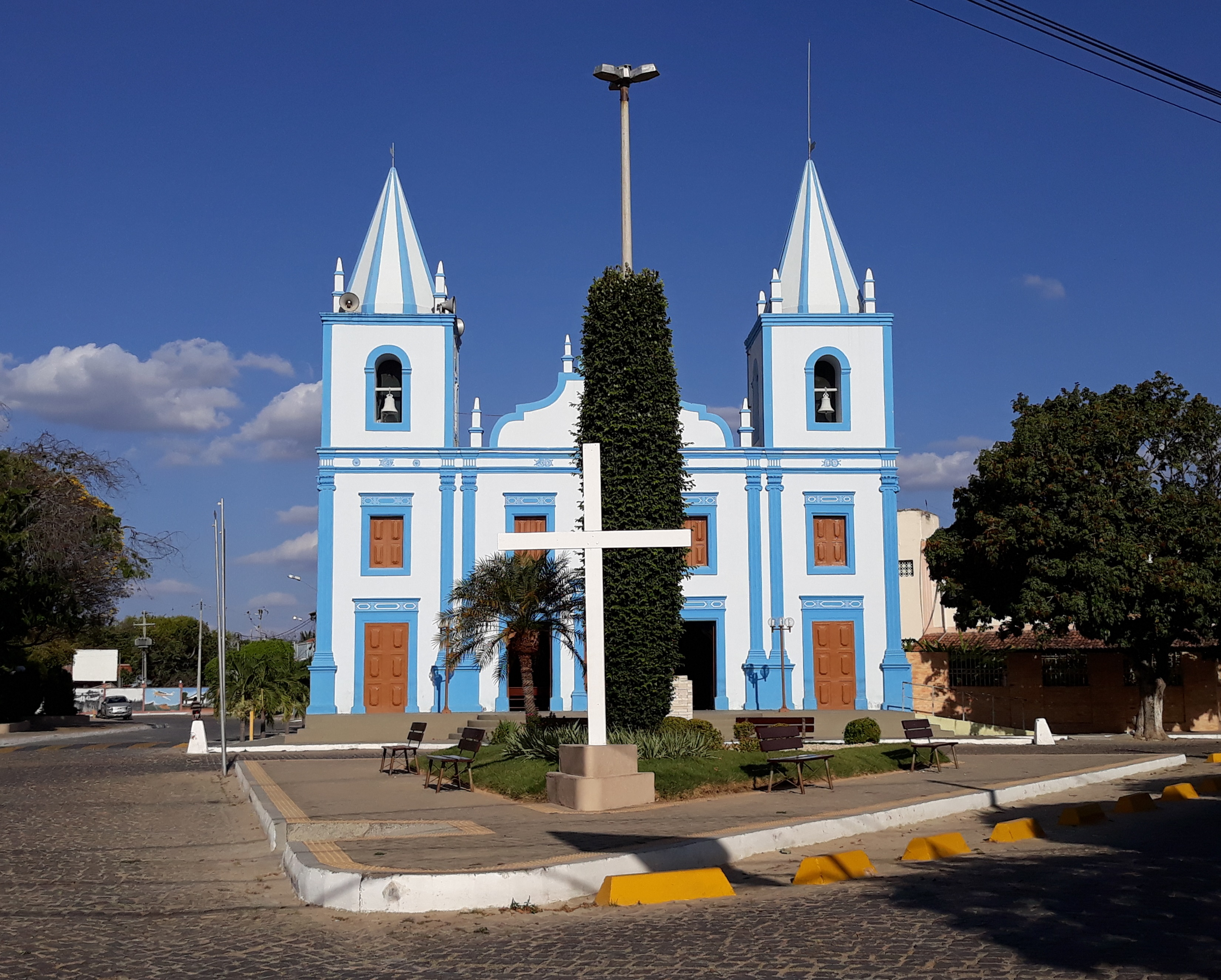 Largo Mozart Diógenes em Martins, Rio Grande do Norte (Brasil), com a Igreja Matriz de Nossa Senhora da Conceição ao fundo.